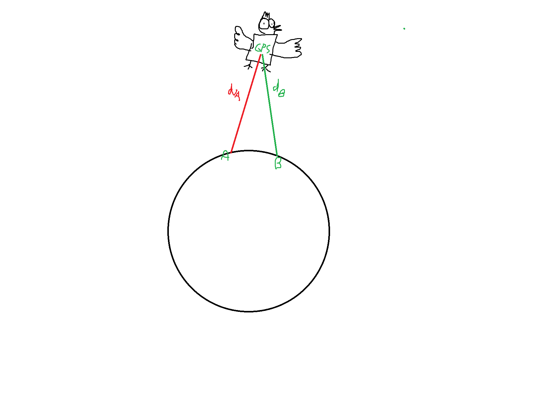 Nakresleno v mspaint!